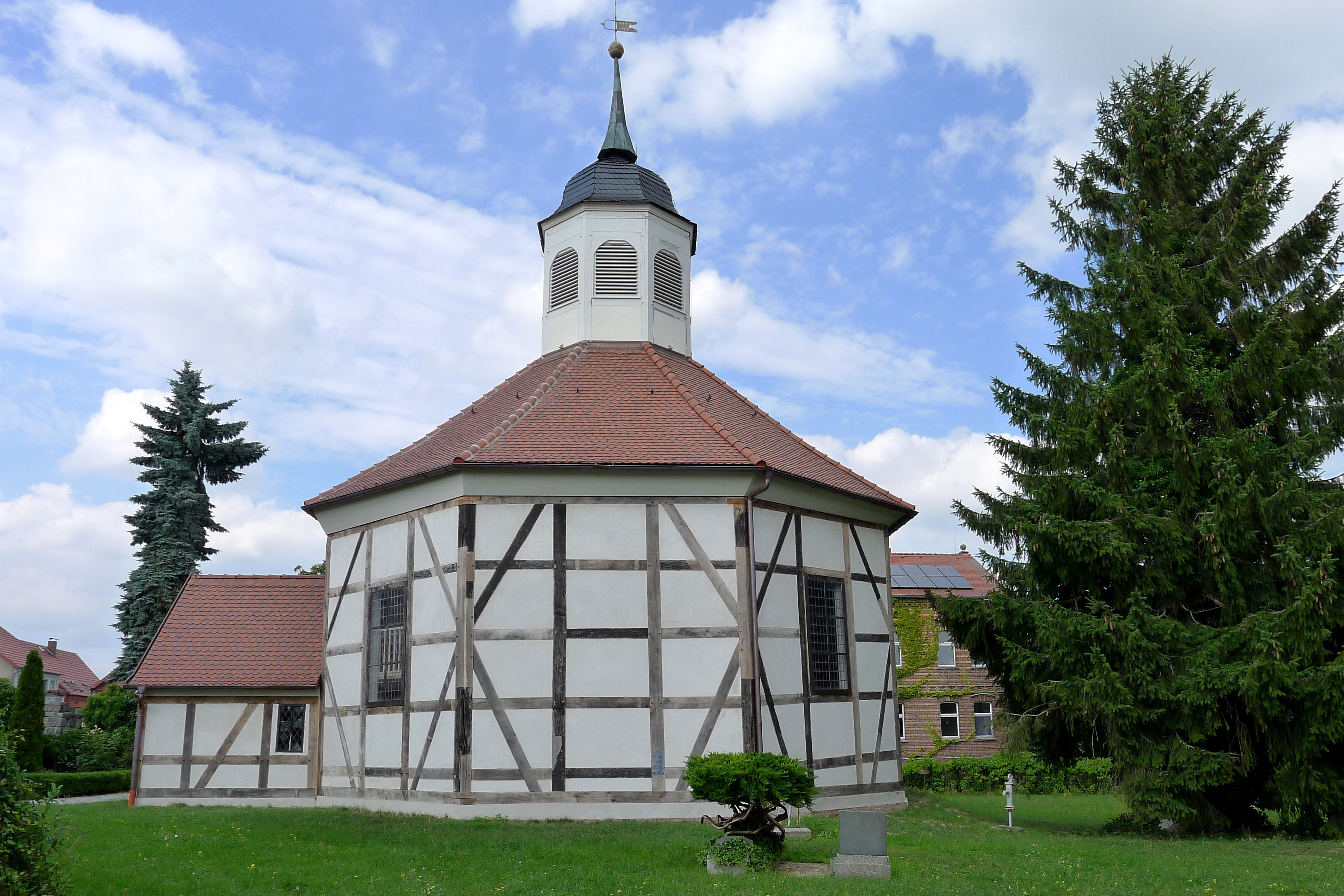 Fachwerkkirche in Gartz bei Havelberg mit ihrem achteckigen Grundriss 1688 erbaut und zeigt sich heute als komplett schiefes Bauwerk. In ihrem Innern finden sich ein Barockaltar und eine Lütkemüller-Orgel von 1871.